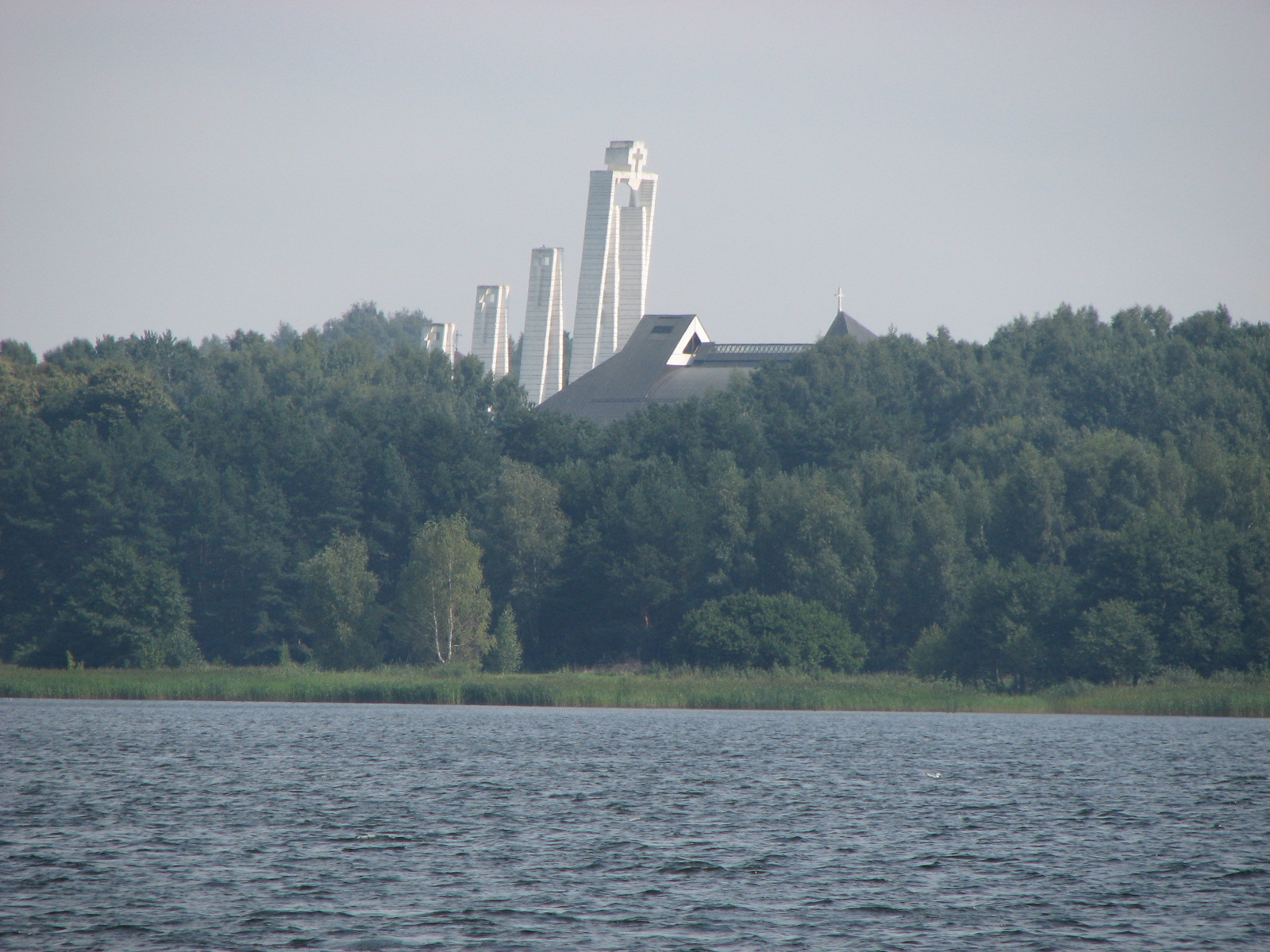 Elektrėnų paminklinio kryžiaus šalia elektrėnų bažnyčios nuotrauka nuo kranto by Ausis